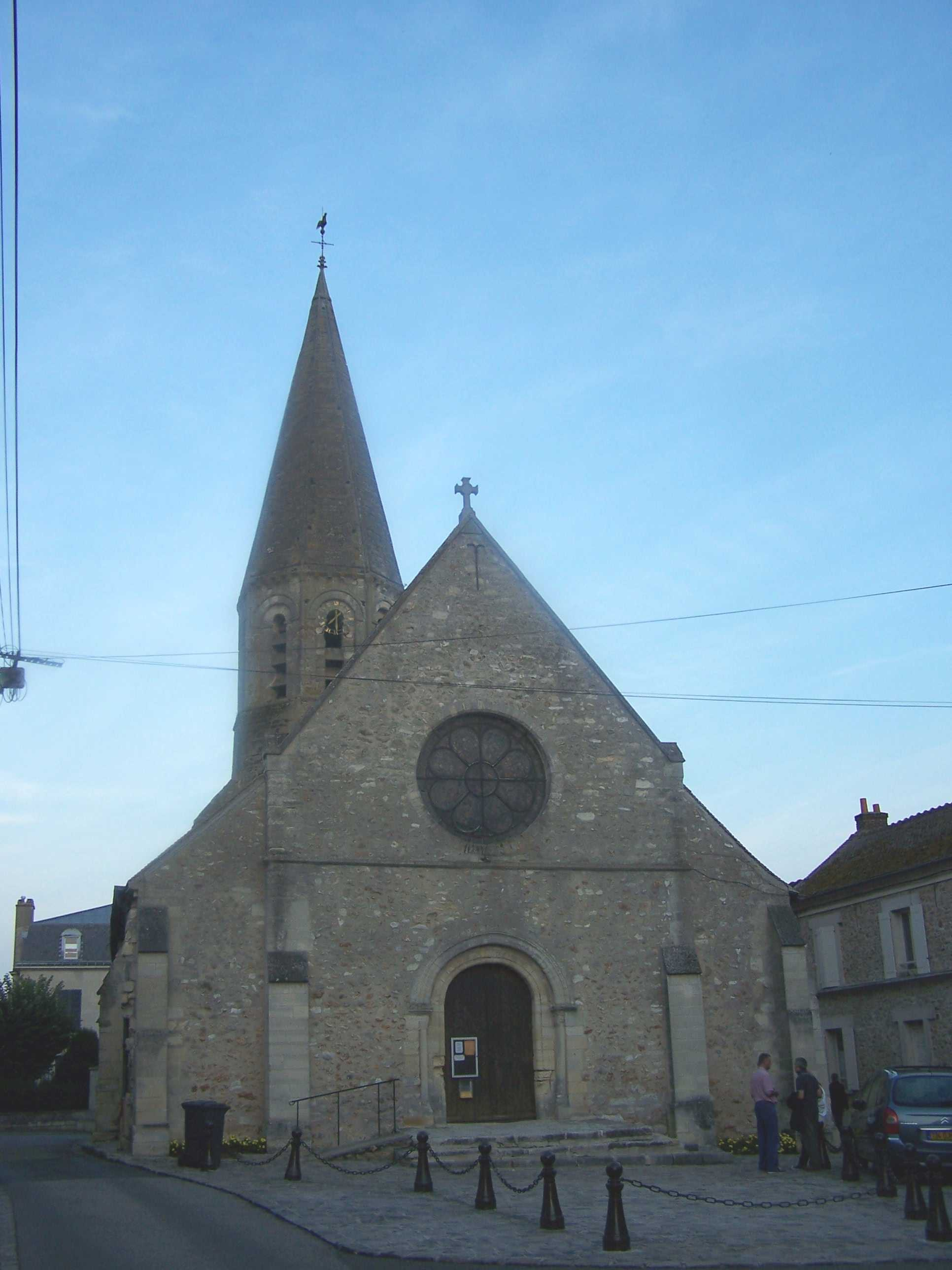 Église de Feucherolles (Yvelines, France)